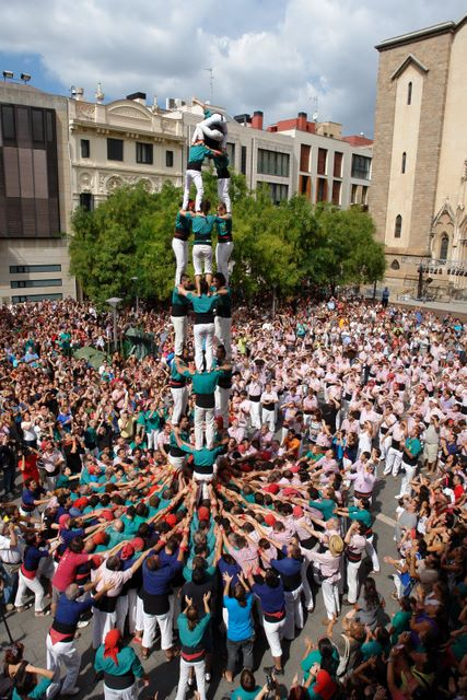 3 de 8 dels Castellers de Sabadell descarregat per la Festa Major de Sabadell (Plaça de Sant Roc, Sabadell, 4 de setembre del 2011).